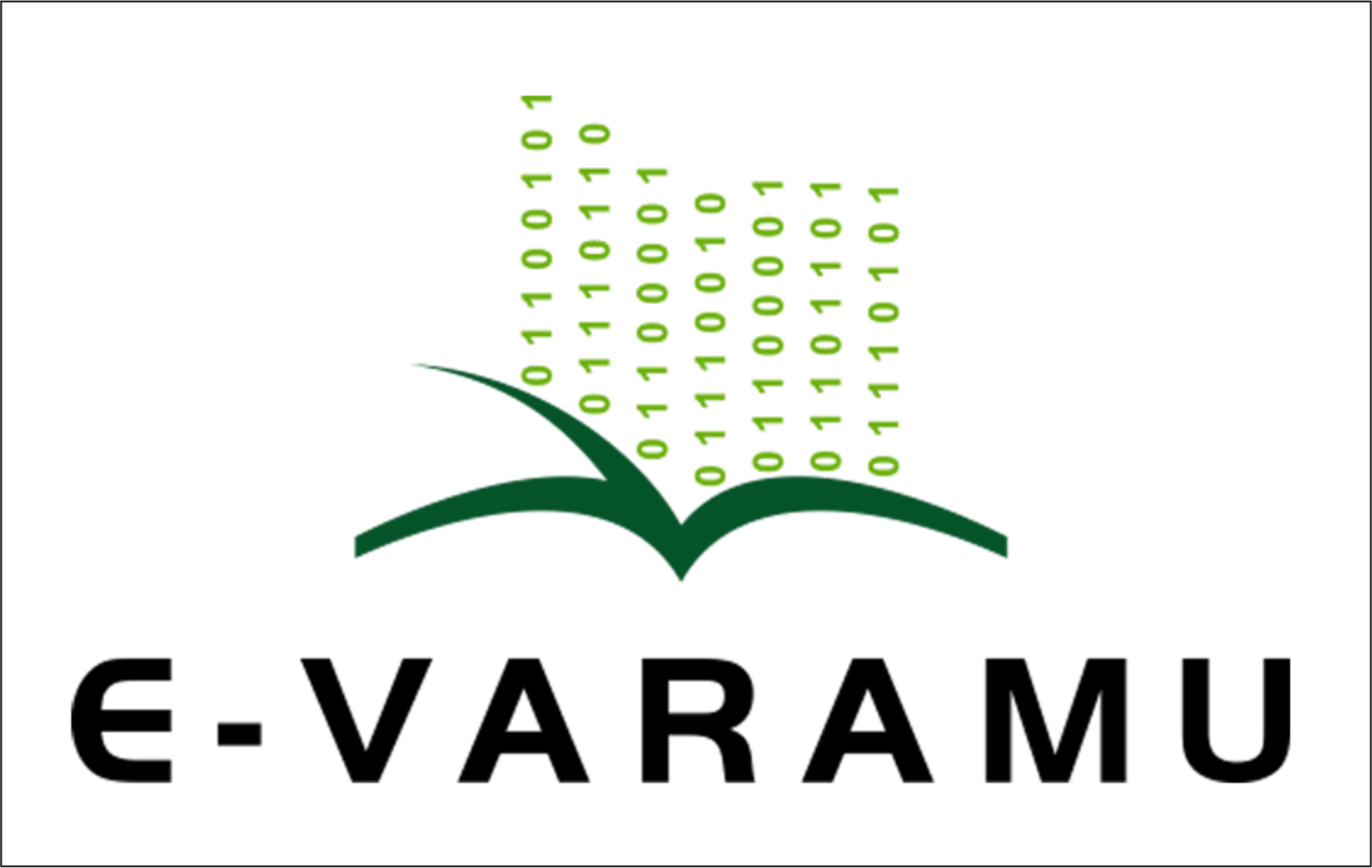 E-varamu logo